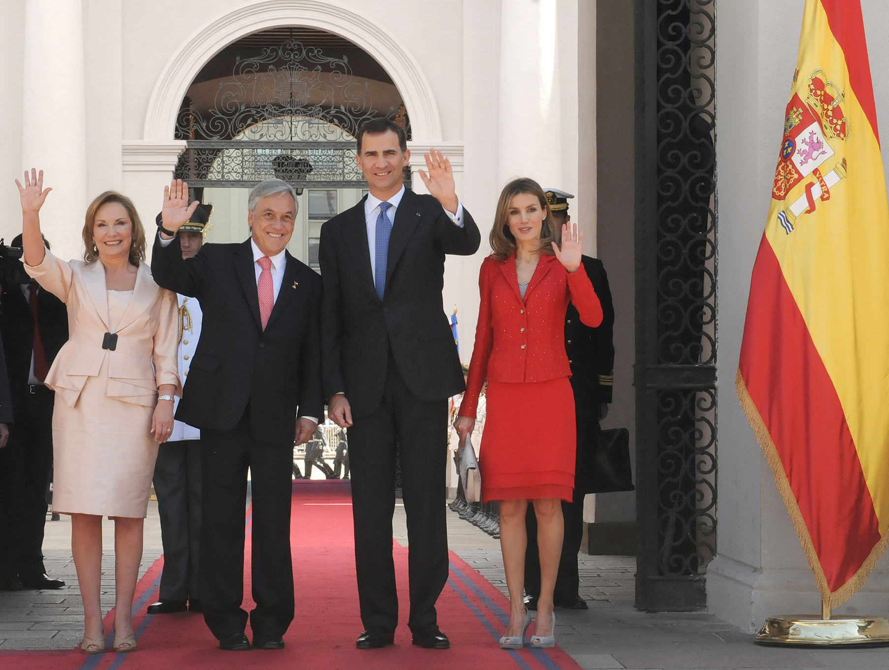 22-11-11 Visita Príncipes de Asturias